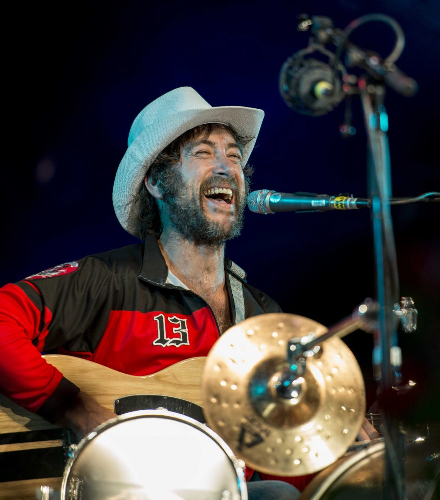 Momentos destacados de la programación cultural de San Isidro 2017